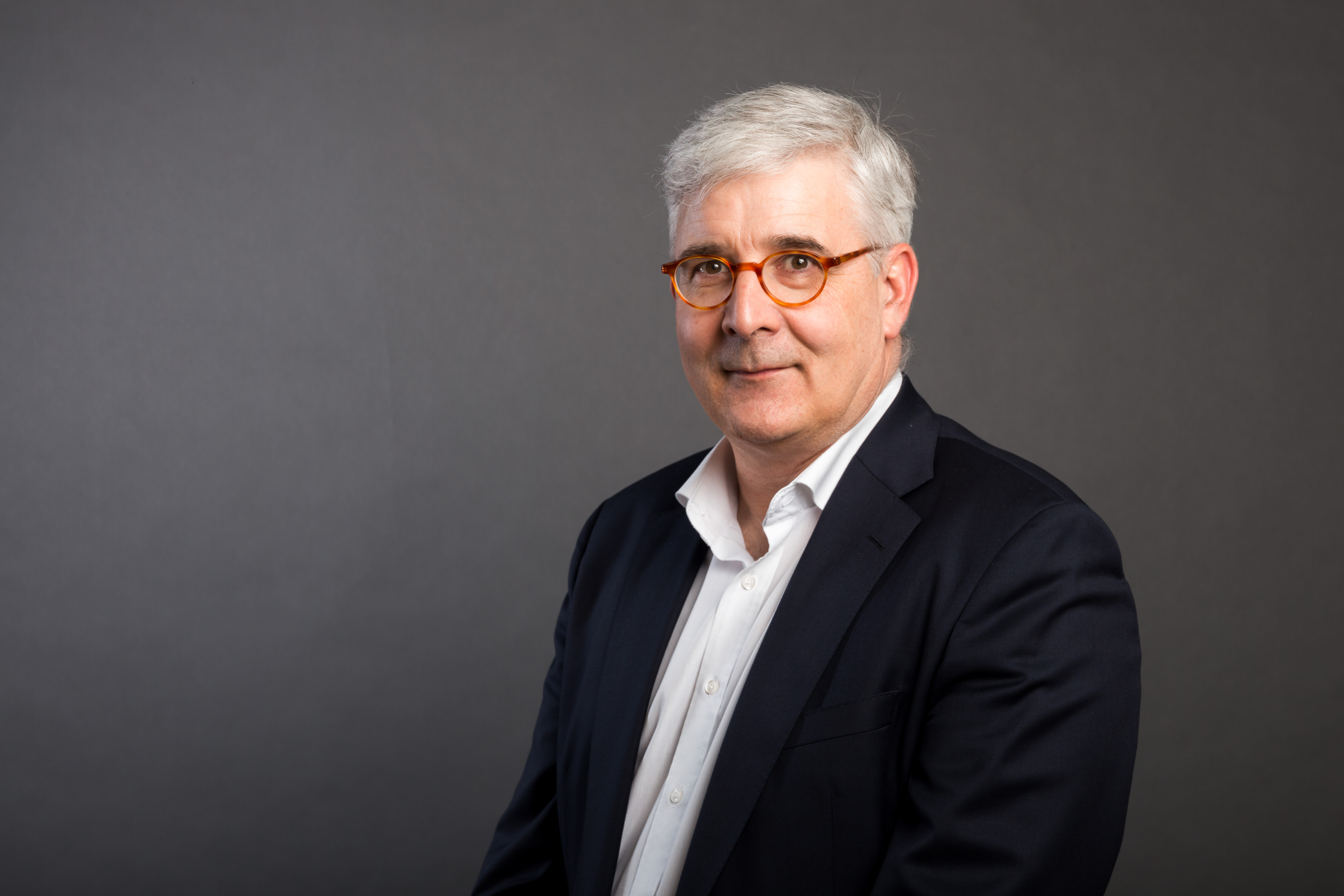 Jan-Marcus Rossa auf dem Landesparteitag der FDP Schleswig-Holstein im März 2019